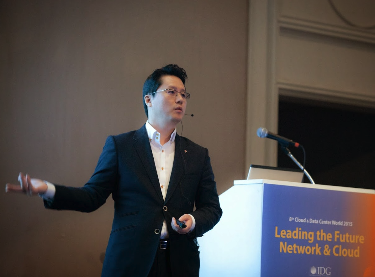 링크브릭스, 뉴스톱, SO1 Engineering 공동 창업자